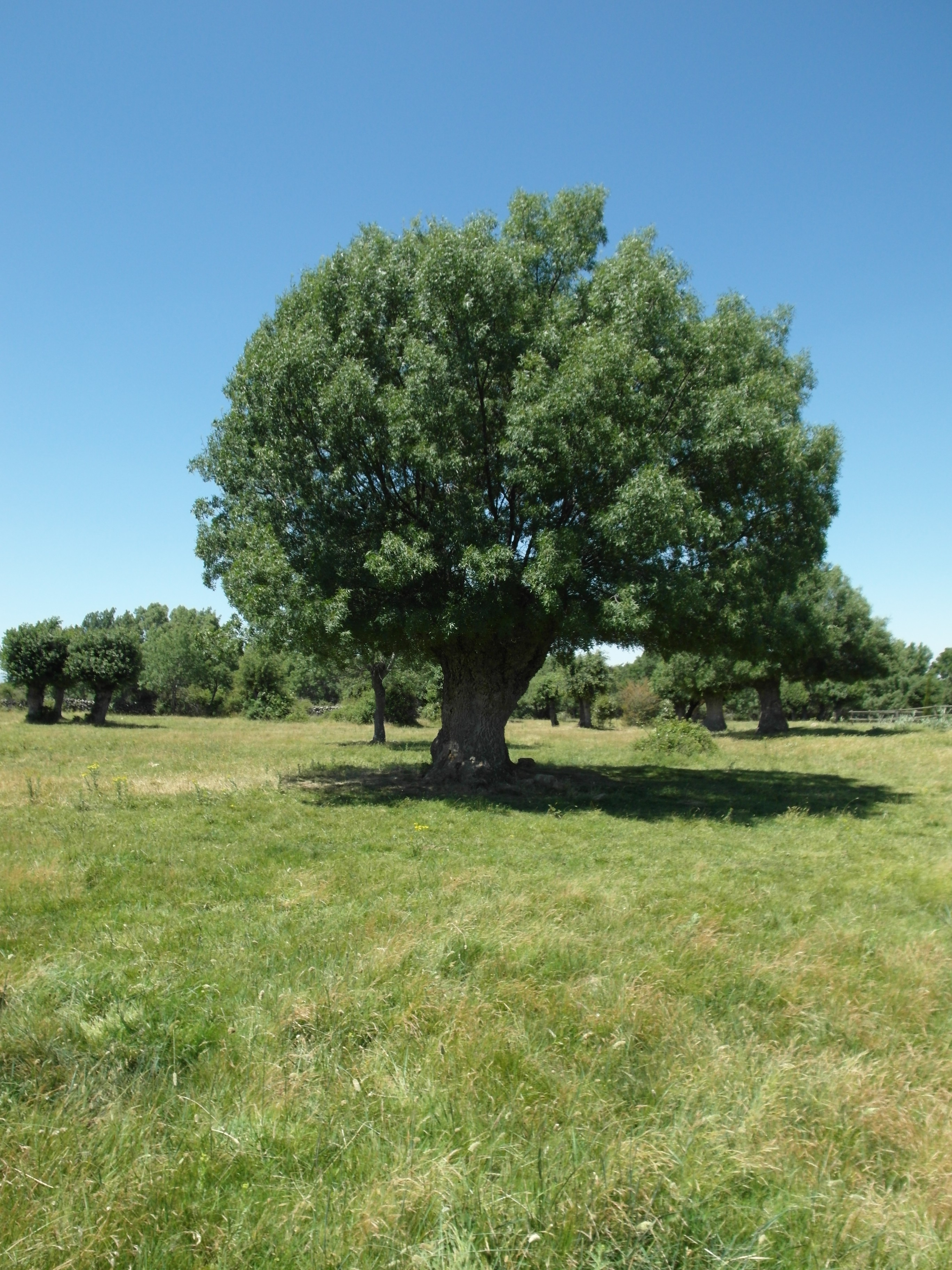 Soto de Revenga, Segovia.